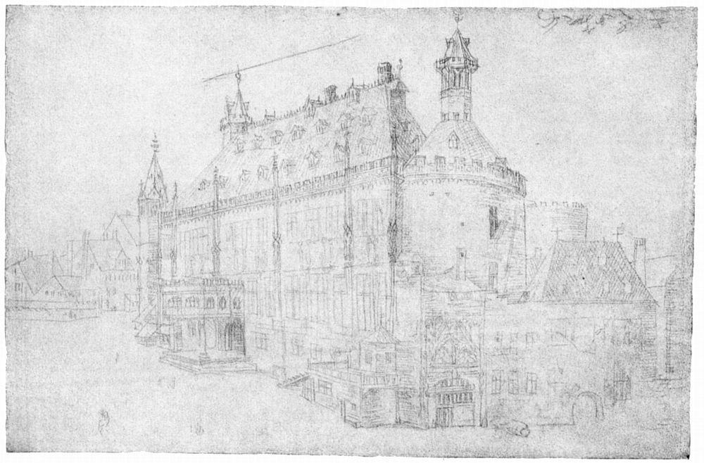 Maße 12,7 × 18,9 cm Technik Silberstift auf Papier Aufbewahrungsort Chantilly Sammlung Musée Condé Epoche Renaissance Land Deutschland Kommentar Architekturzeichnung, aus dem Silberstiftskizzenbuch, das während der Reise in die Niederlande entstand